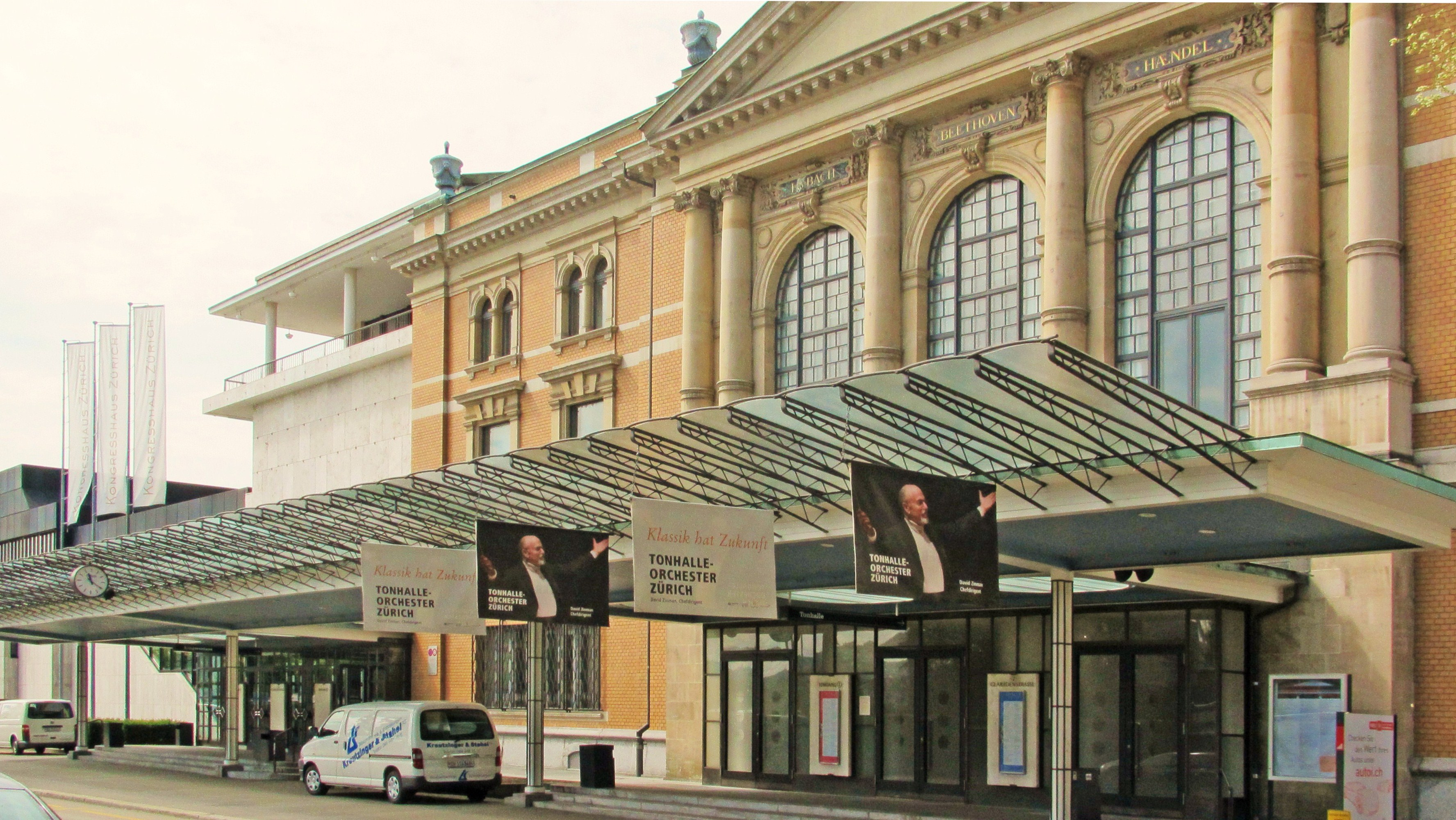 Zürich,Kongresshaus und Tonhalle, Gotthardstrasse 5